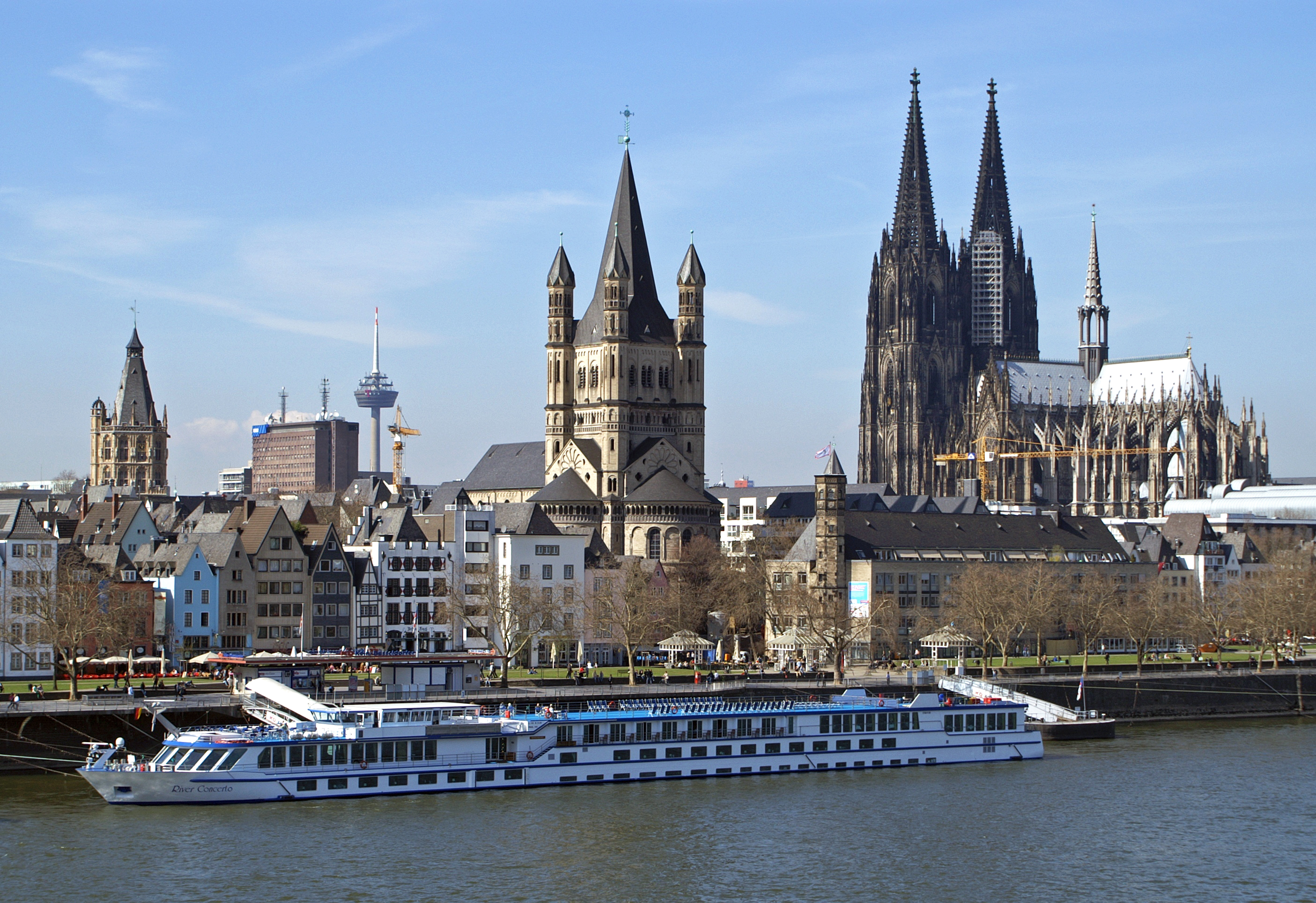 Flusskreuzfahrtschiff River Concerto am Anleger Köln, Frankenwerft.